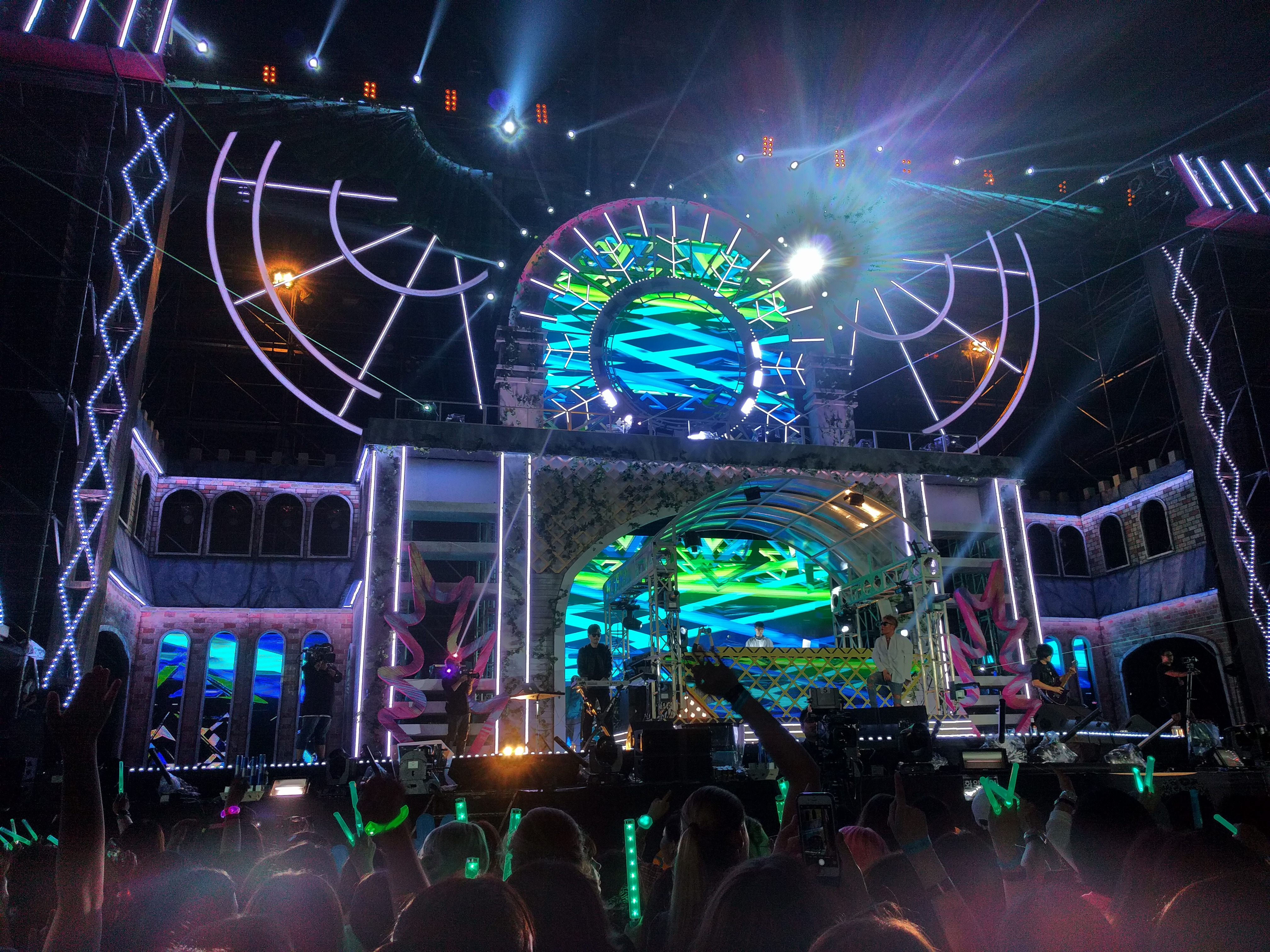 2016년 스펙트럼 댄스 뮤직 페스티벌 드림 스테이션 무대에서 공연하는 비트 버거